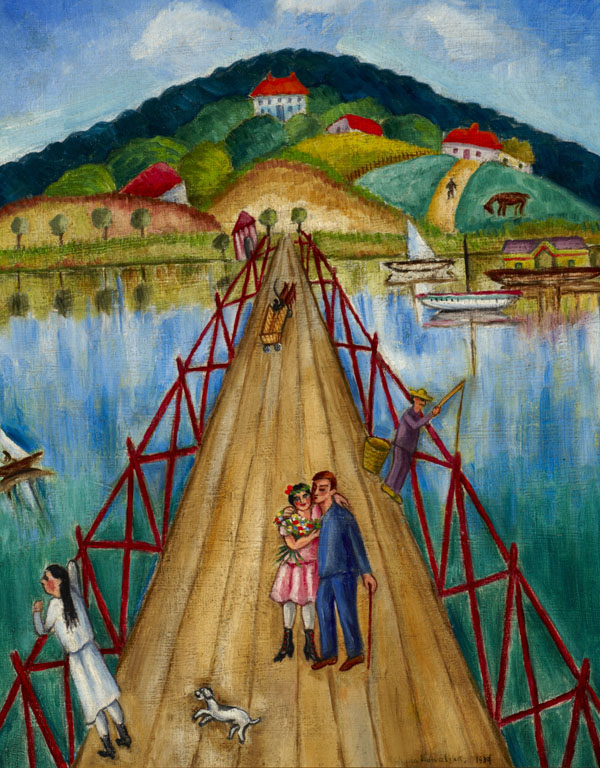 Brücke